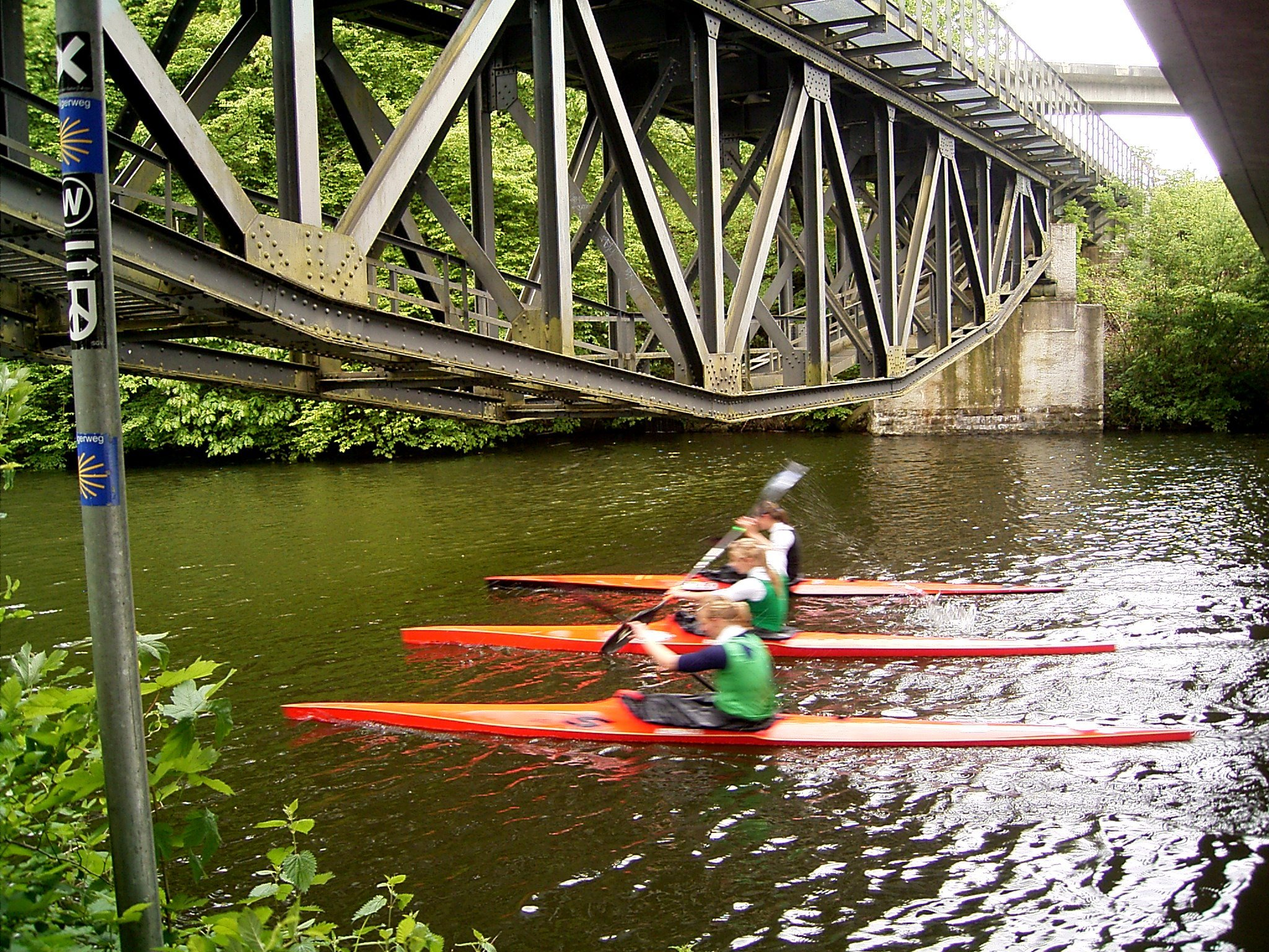 Fischbauchbrücke Beyenburg über den Beyenburger Stausee in Wuppertal / Ennepetal